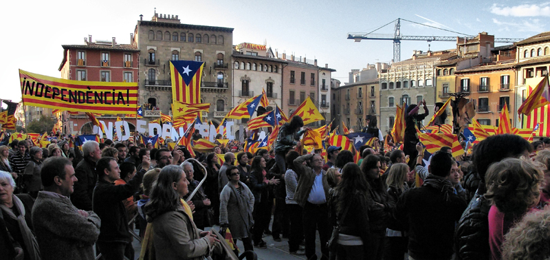 Plaça major de la ciutat al final del Lip dub per la independència de Vic del 24 d'octubre del 2010.